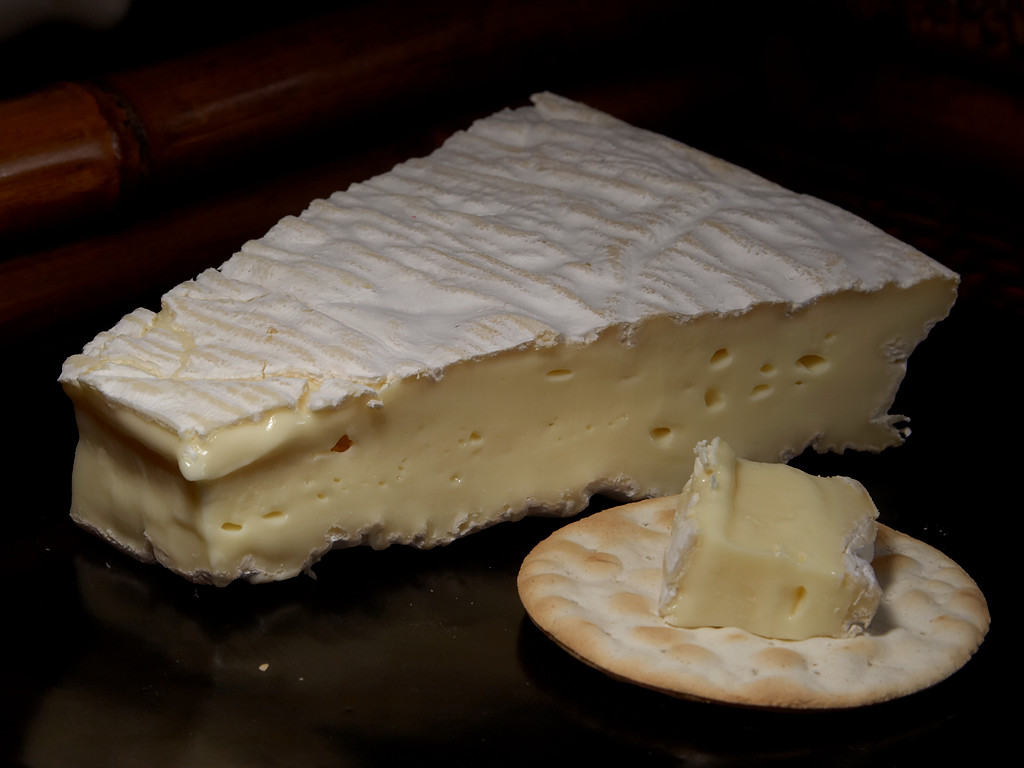 Brie de Meaux cheese